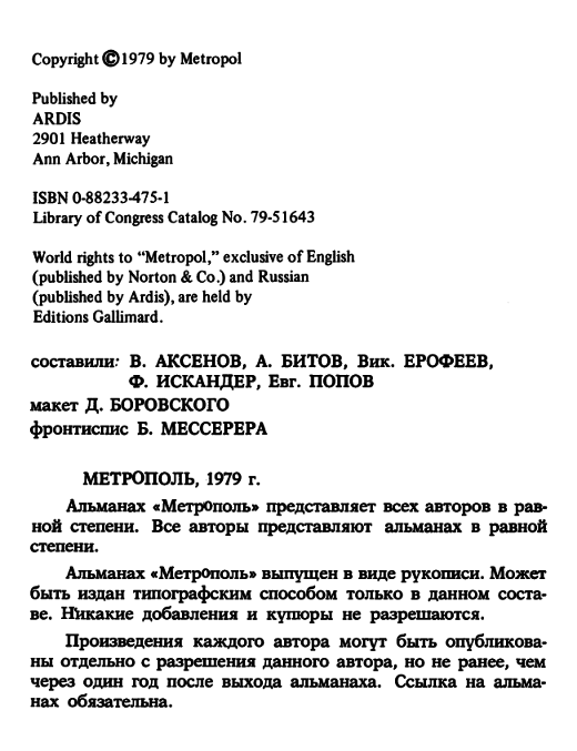 Метрополь Литературный альманах М , Анн Арбор Ардис , 1979